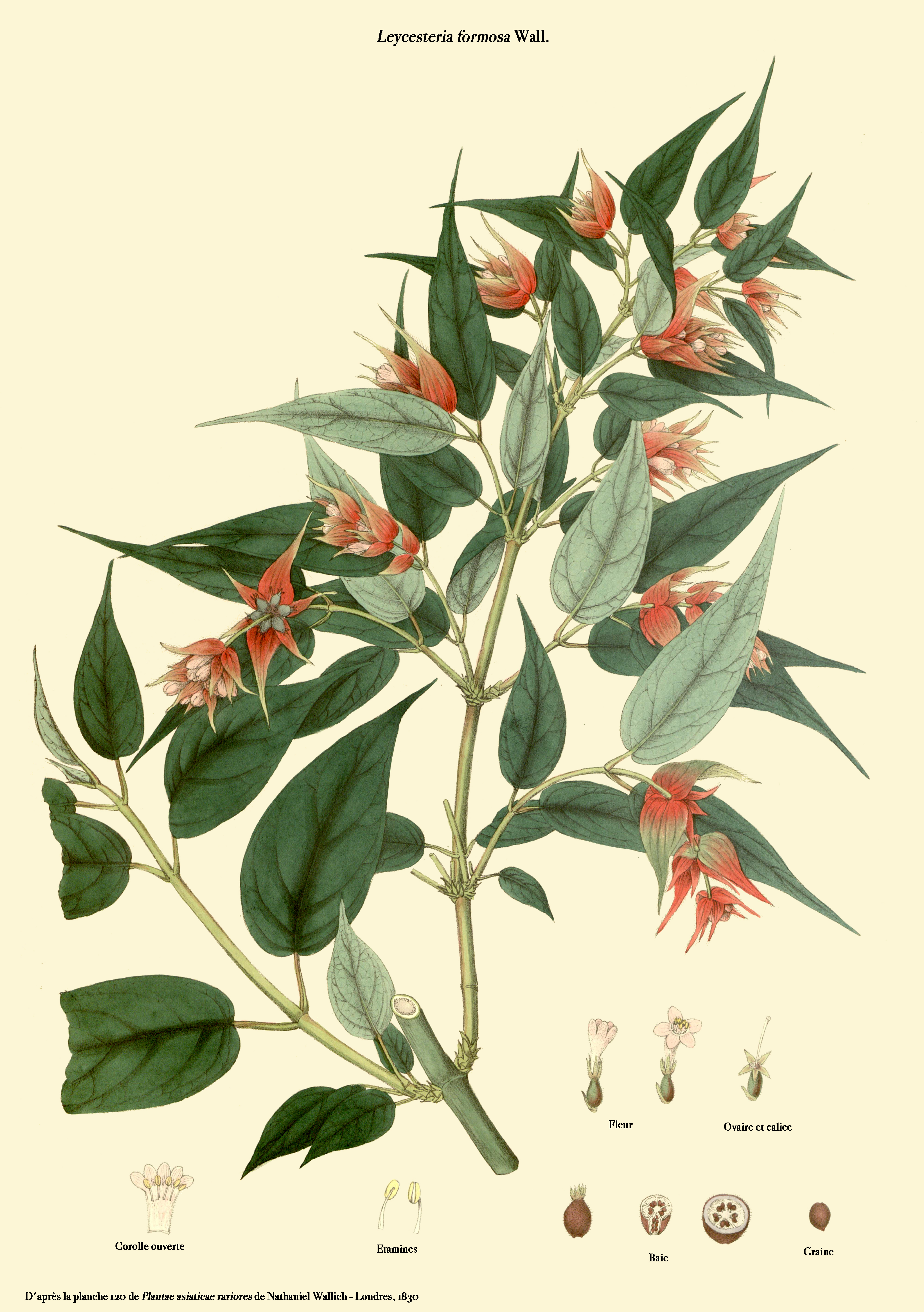 Leycesteria formosa - Planche 120 de Plantae asiaticae rariores - Volume 2 - de Nathaniel Wallich - Londres, 1830 - Planche reprise par D. Prévôt